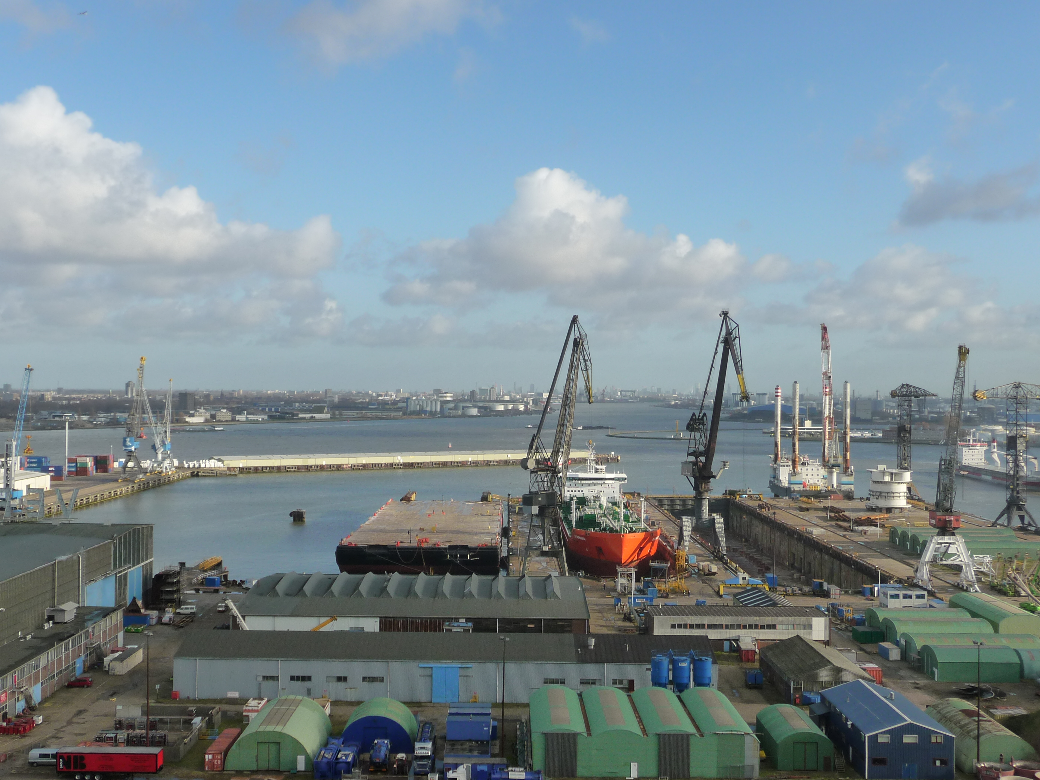 Eerste Werkhaven met Keppel Verolme dok 5 & 6 en de RN Murmansk in dok 5.